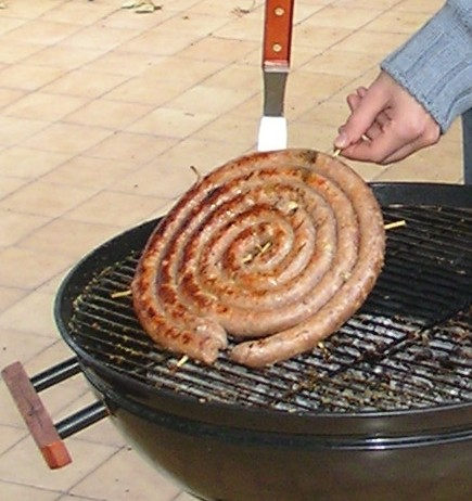 Salsiccia - italienische Bratwurst, hier Sizilien